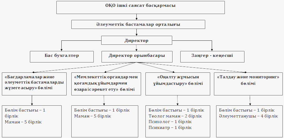 ОҚО ішкі саясат басқармасының «Әлеуметтік бастамалар орталығы» коммуналдық мемлекеттік мекемесінің штаттық құрылымы